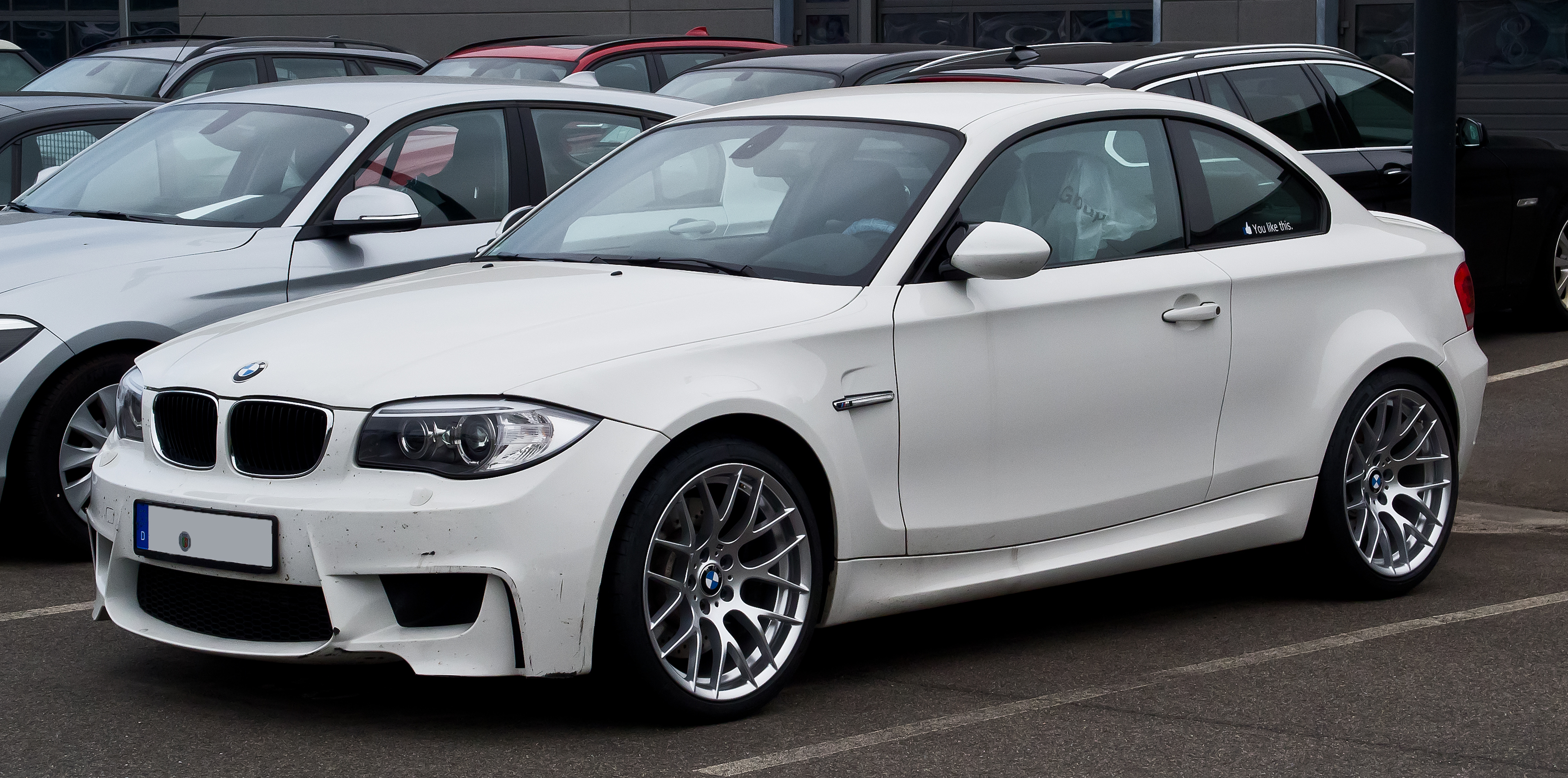 BMW 1er M Coupé (E82)